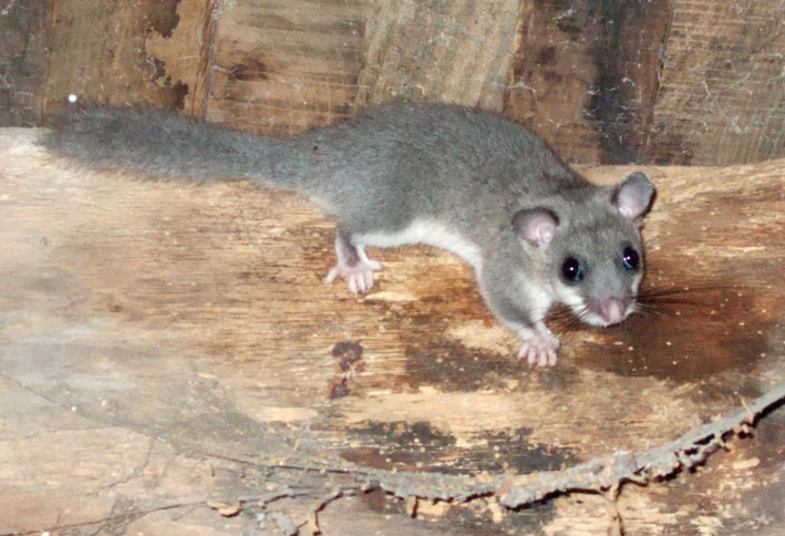 Loir Gris